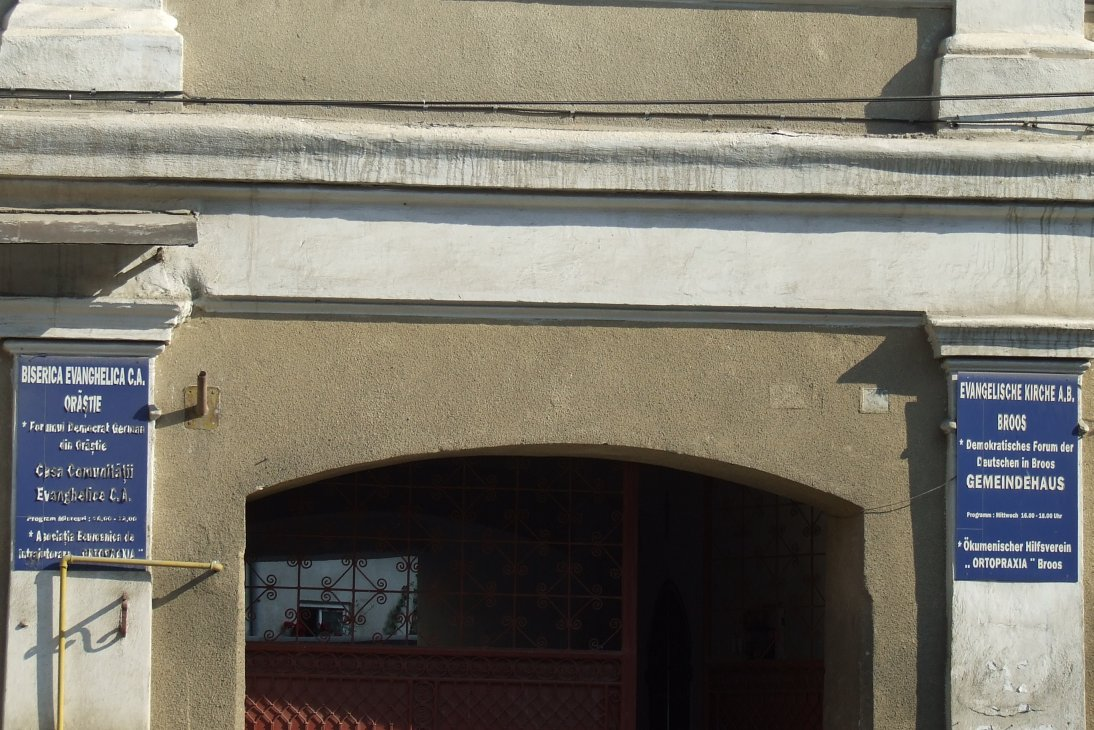 Image from Orăştie, Romania